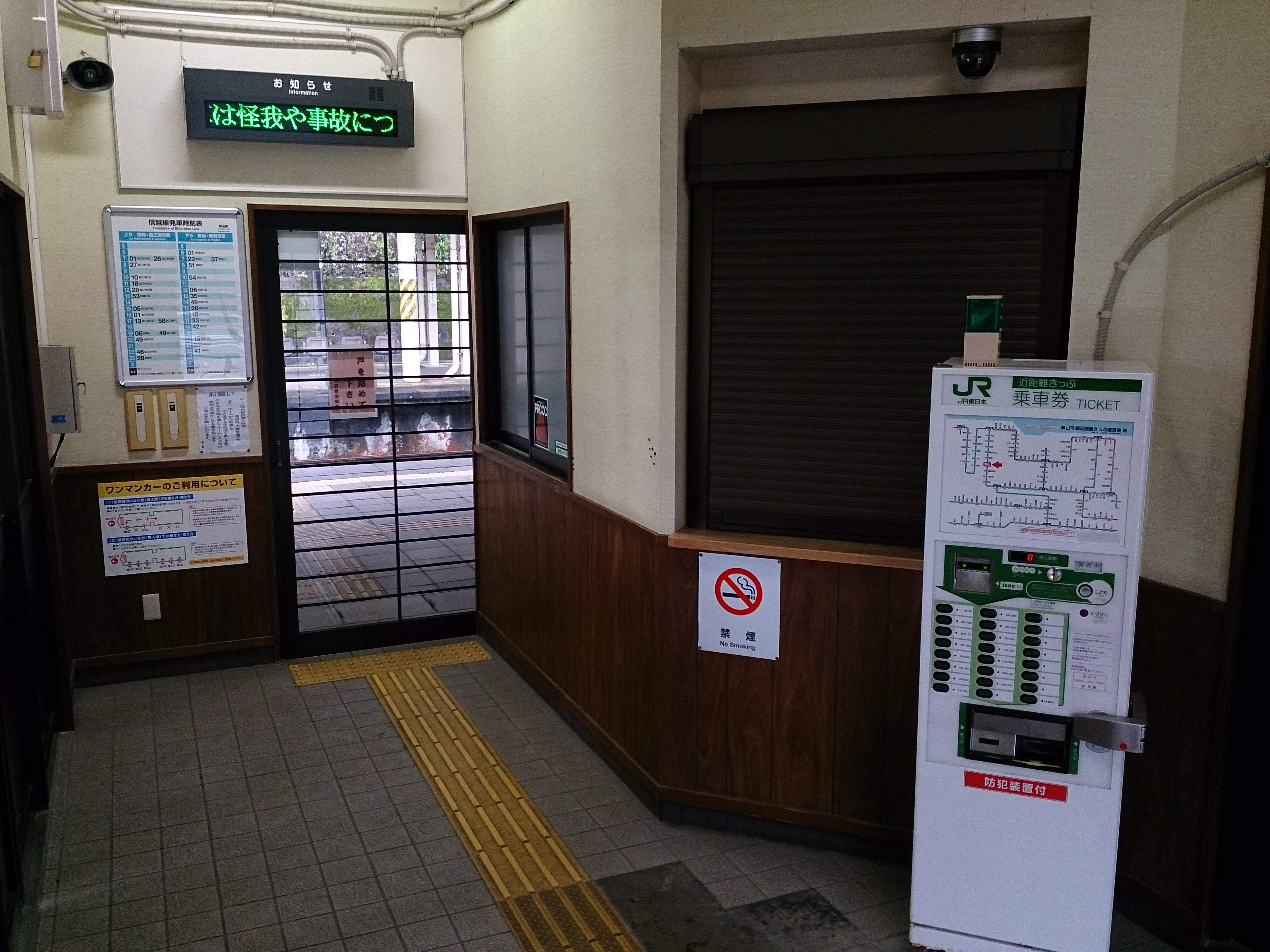 無人化後の塚山駅のコンコース